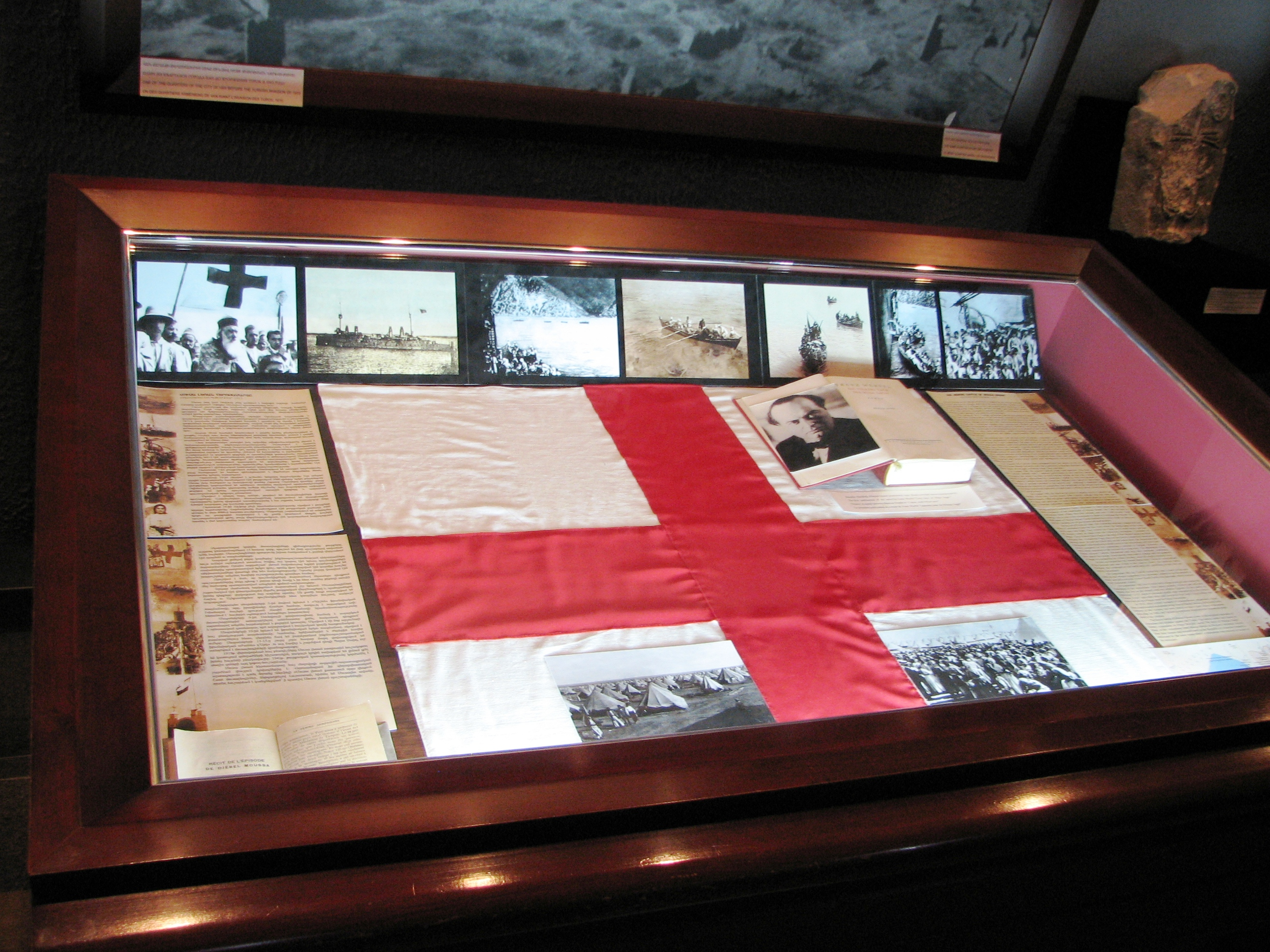 Armenian Genocide Museum-Institute in Yerevan, Armenia המוזיאון לרצח העם הארמני בירוואן בירת ארמניה The Forty Days of Musa Dagh in the museum חלון התצוגה במוזיאון המציג את ספרו של ורפל ארבעים הימים של מוסה דאג